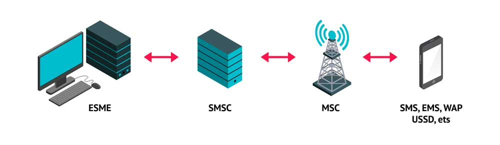 Схема работы smpp-протокола